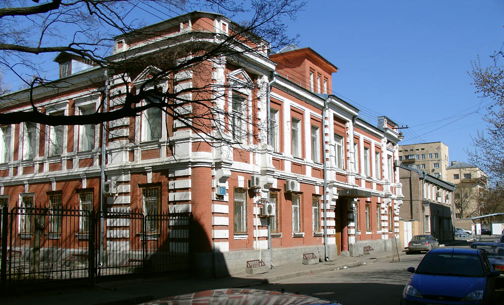 Khomutovsky lane, Moscow Москва. Хомутовский тупик, 7